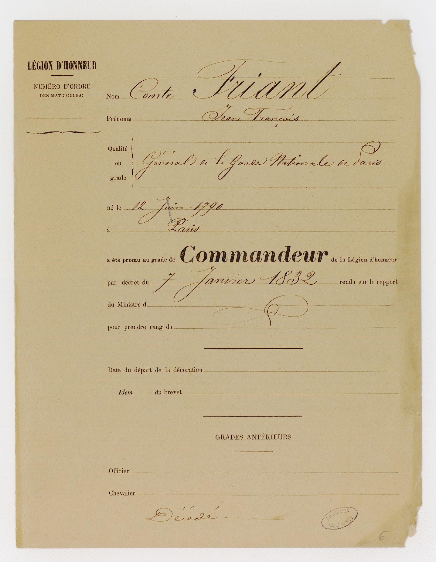 Couverture du dossier de Légion d'honneur de Jean-François Friant, Archives nationales, LH/1037/86